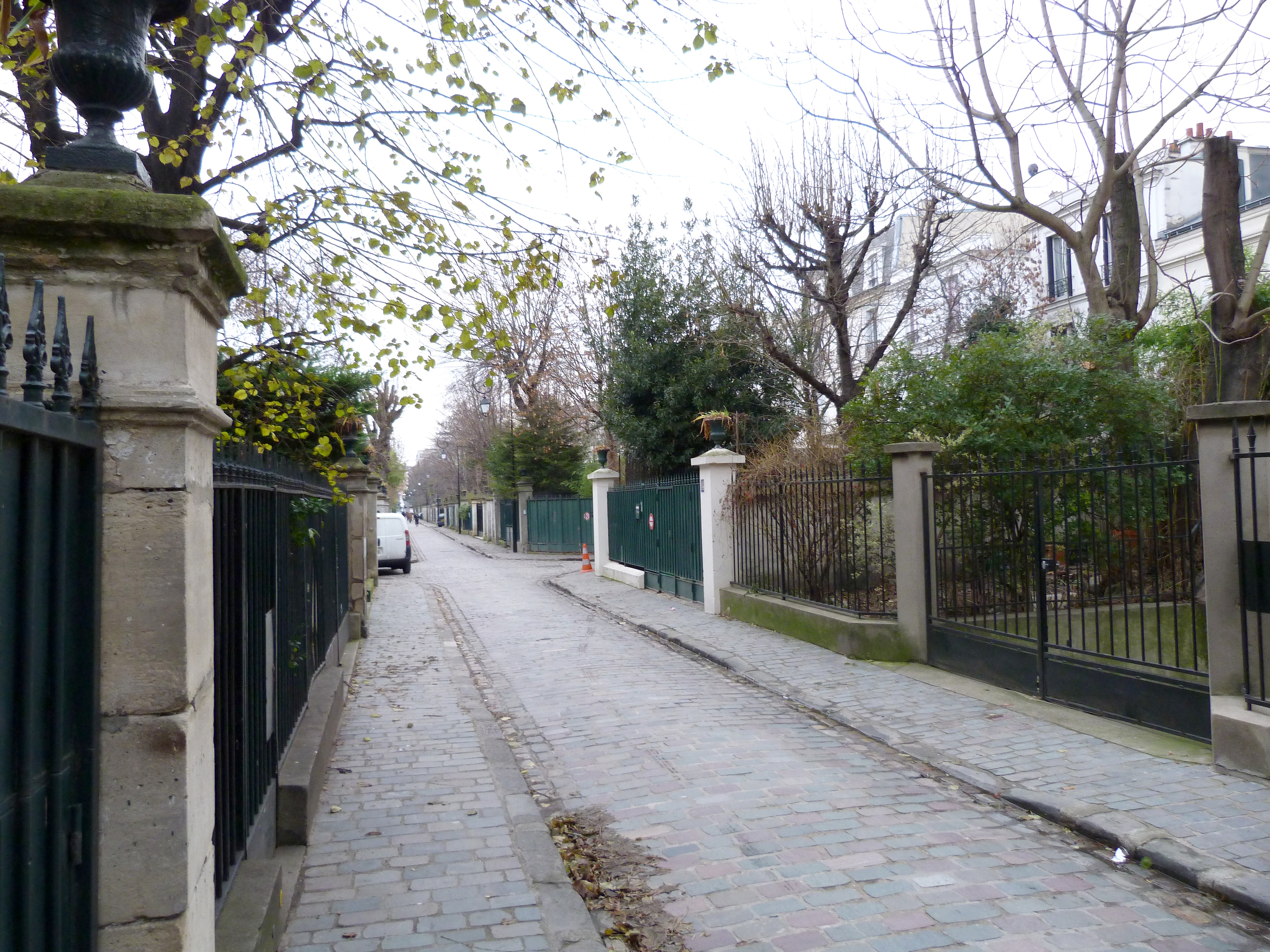 Cité des Fleurs, voie privée, Paris (17e arrond.), vue générale en direction de la rue de la Jonquière.